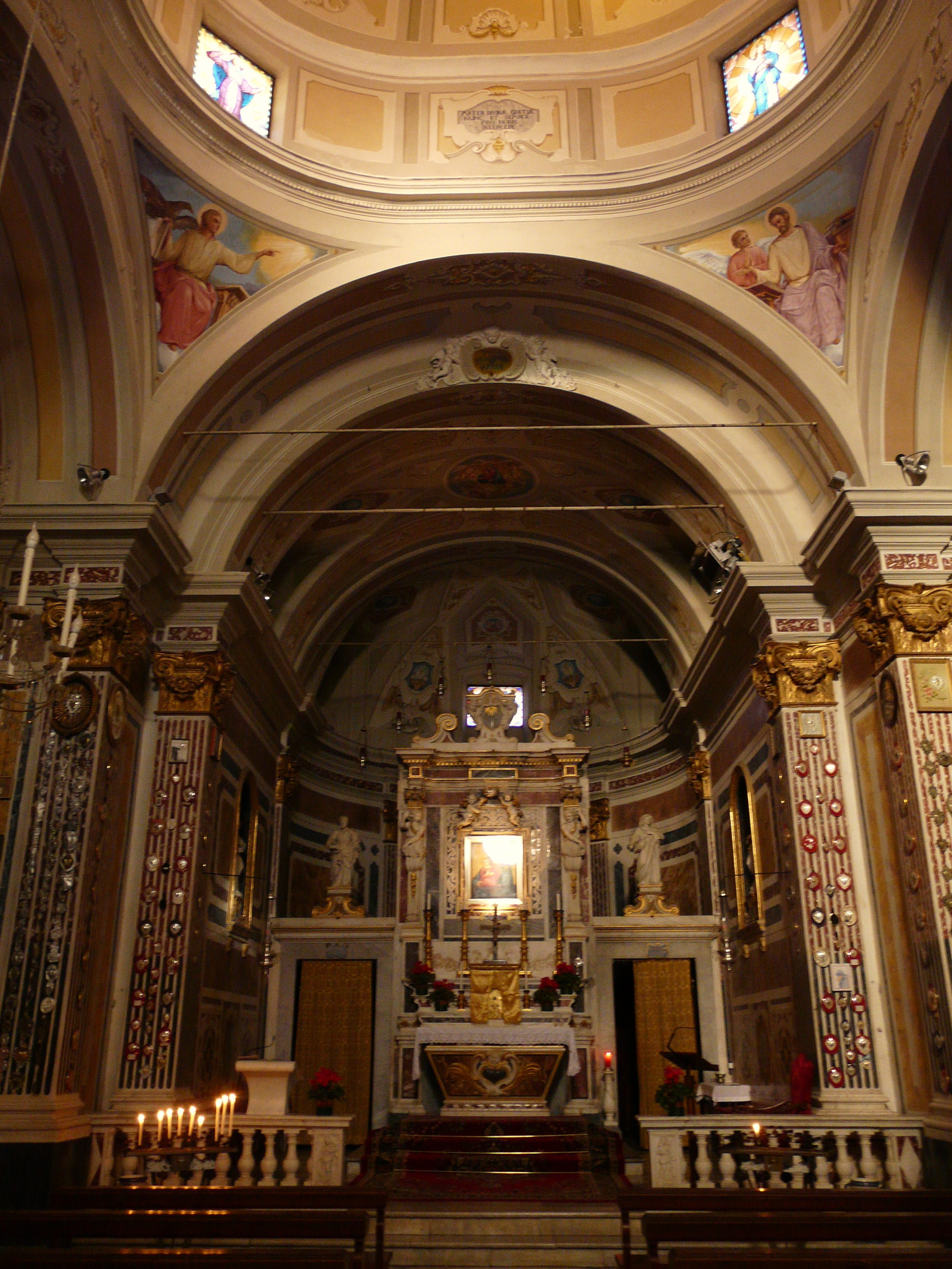 Interno del santuario di Nostra Signora di Roverano, Termine di Roverano, Borghetto di Vara, Liguria, Italia